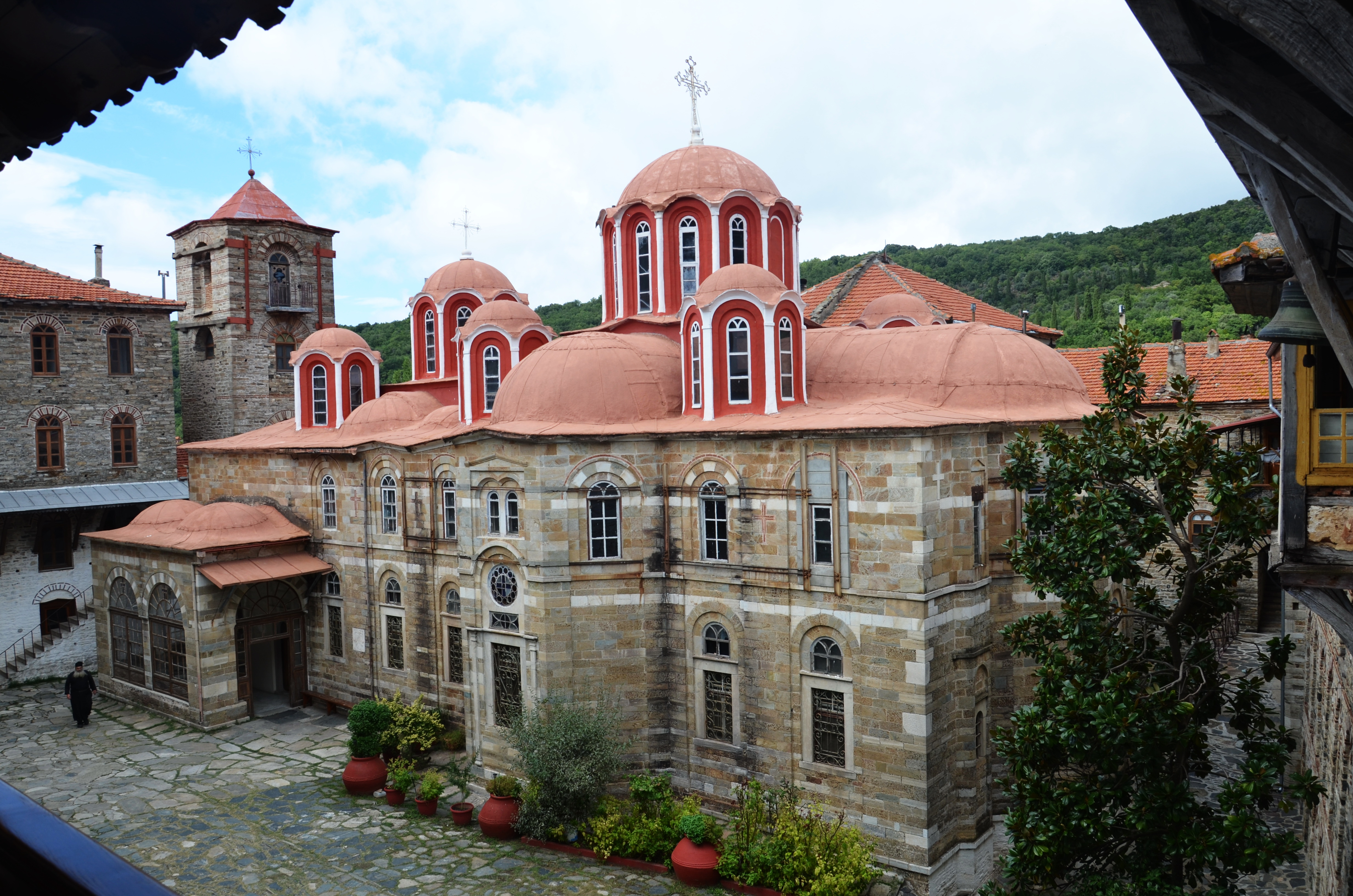 Манастир Констамонит